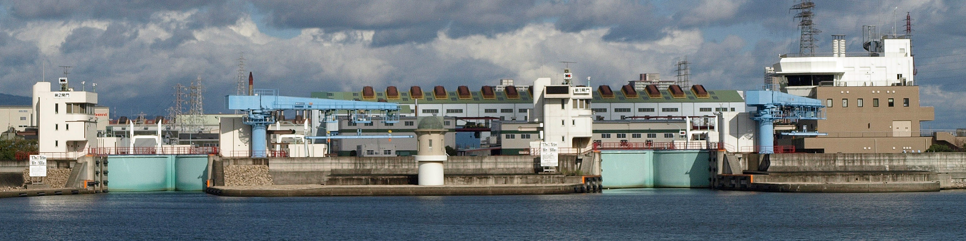 尼崎閘門 尼崎港側全景